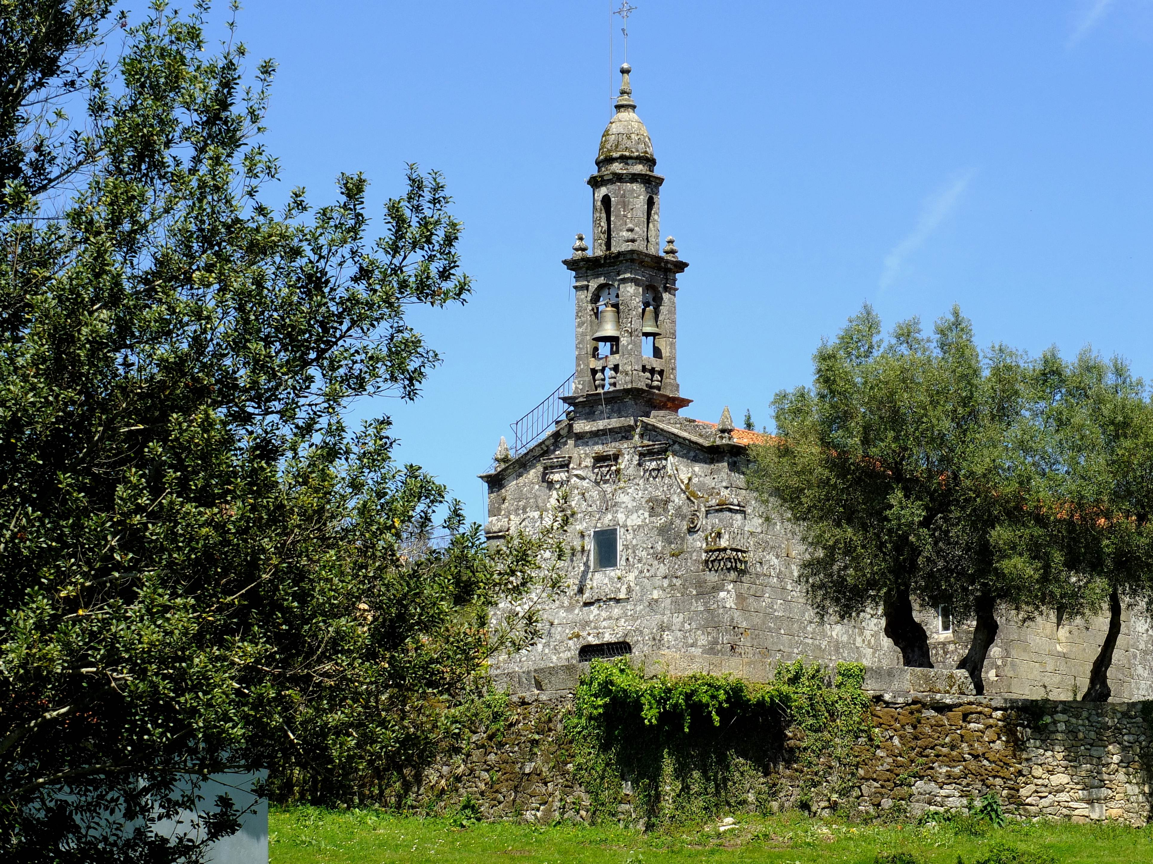 Igrexa de San Lourenzo de Sabucedo, A Estrada